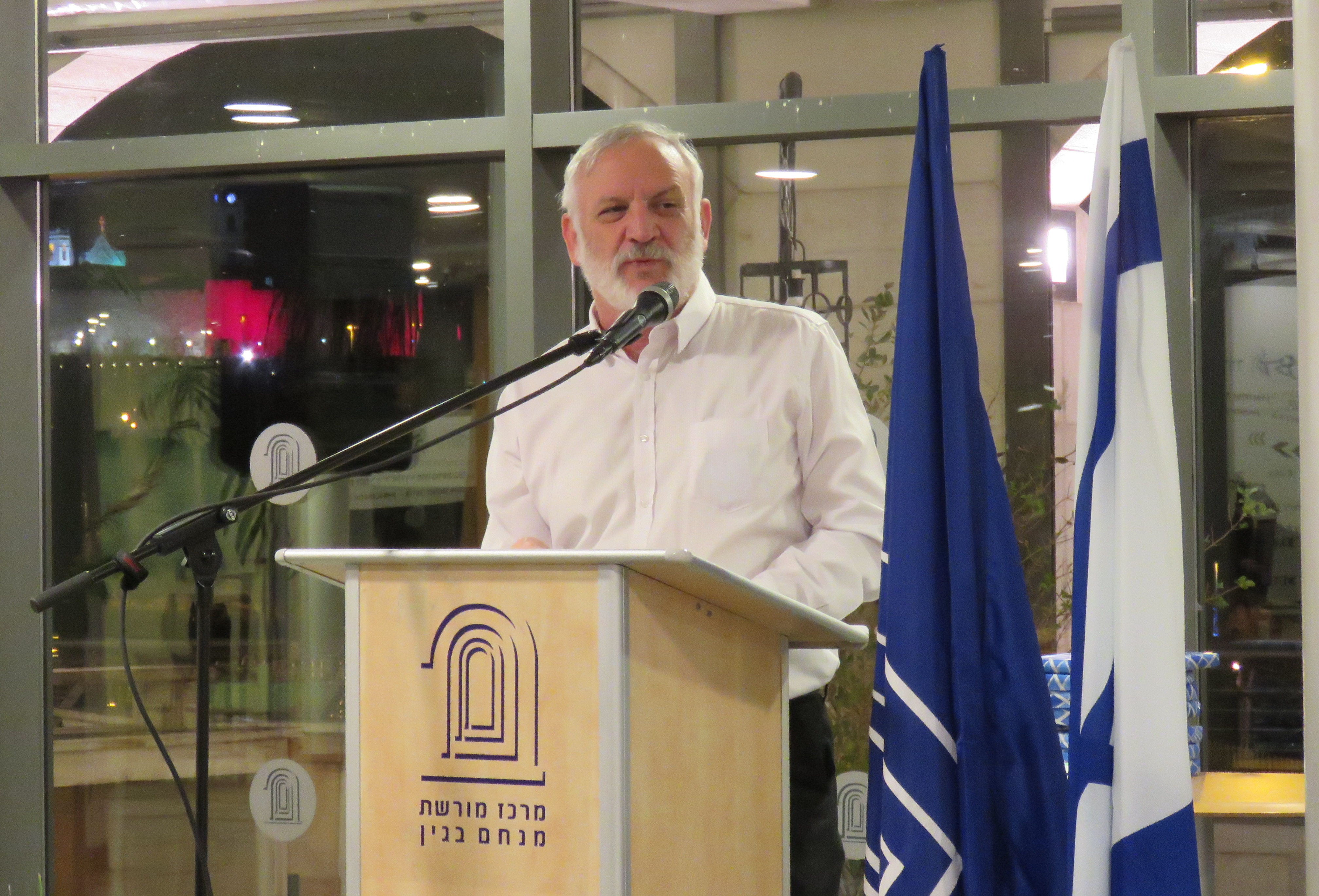 הרצי מקוב מנהל המרכז למורשת בגין